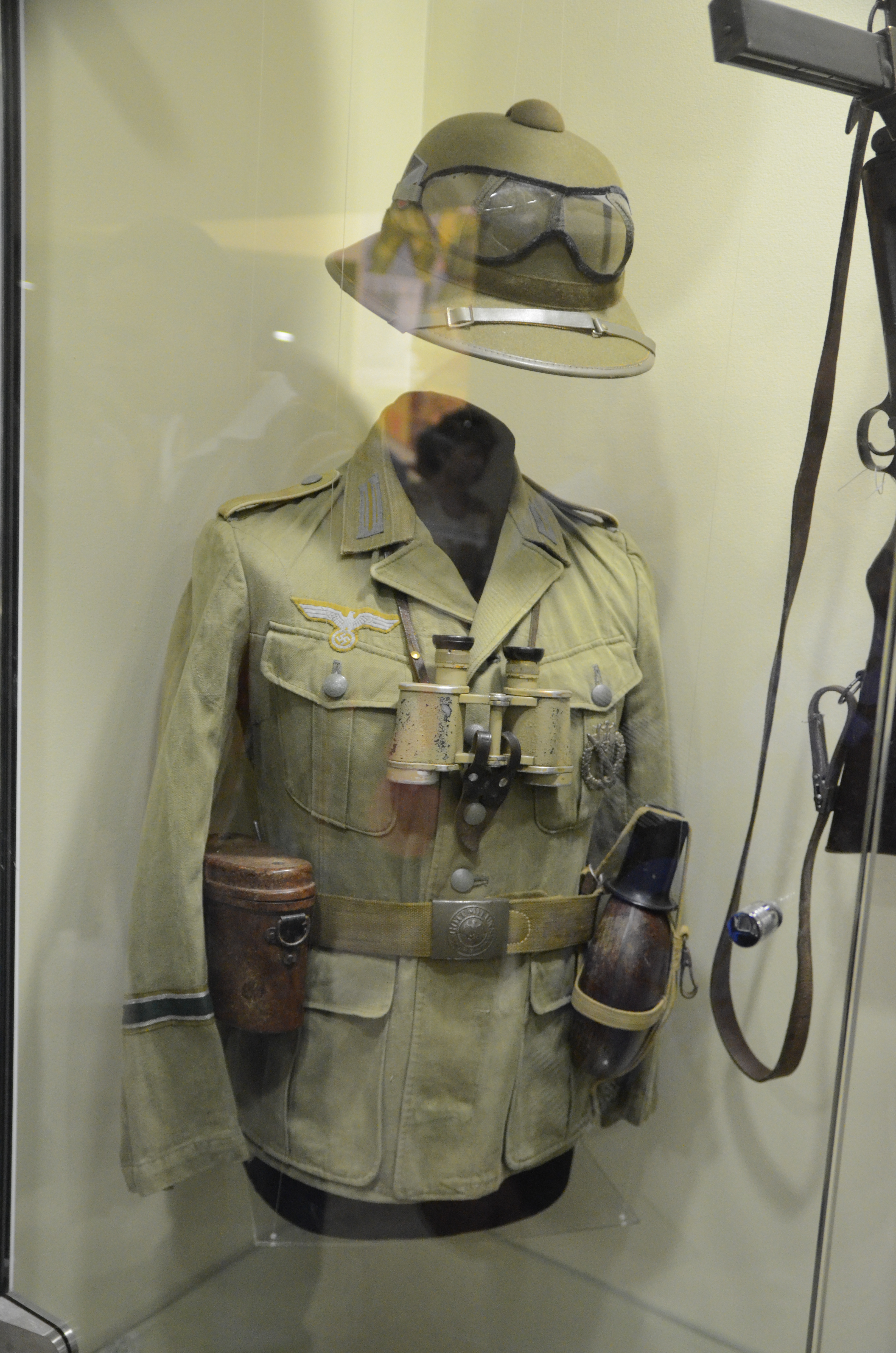 День Победы в Донецке